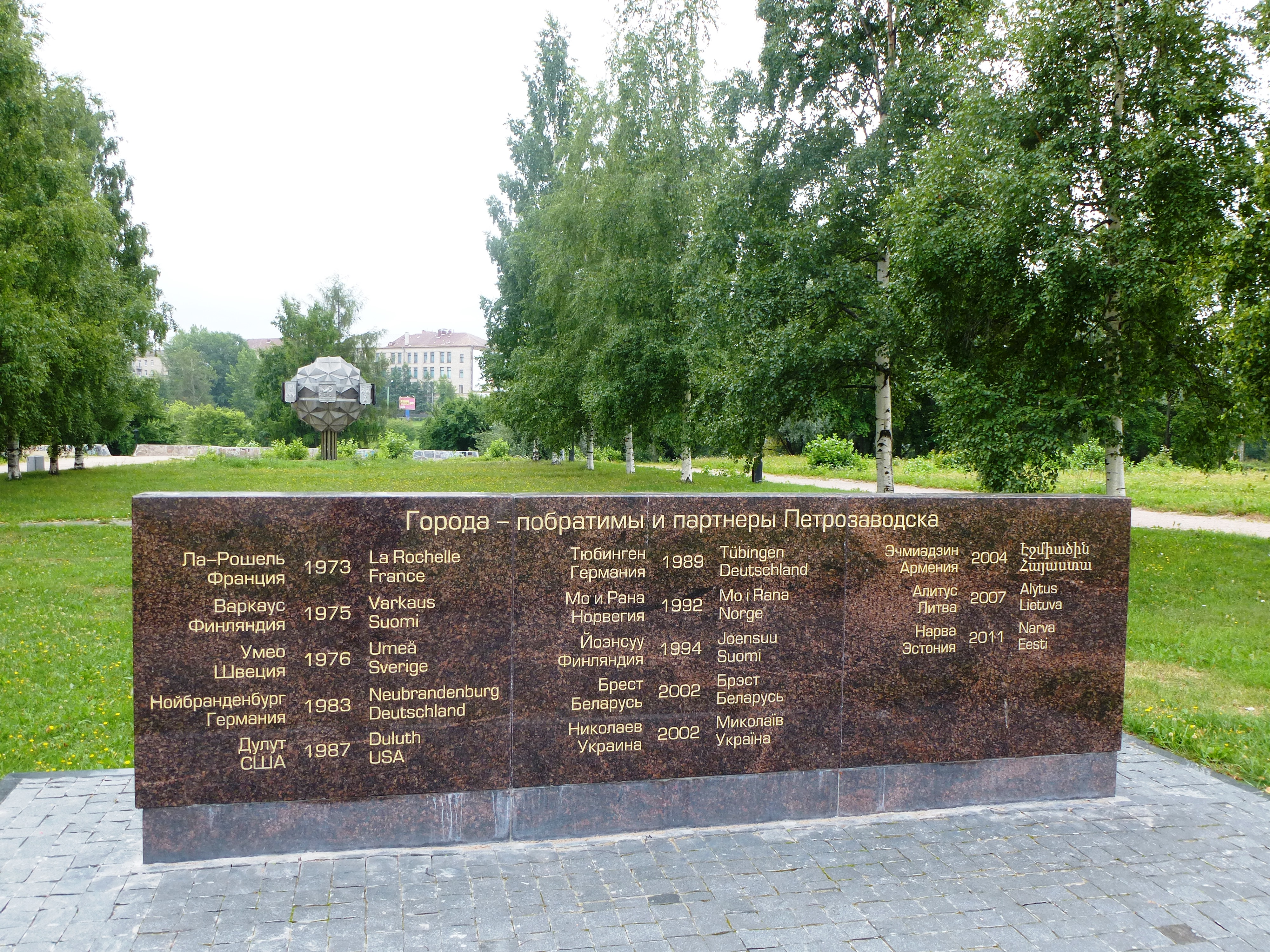 Памятный знак на Аллее городов-побратимов Петрозводска (пл.Кирова).